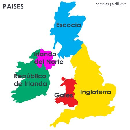 Inglaterra y Gales